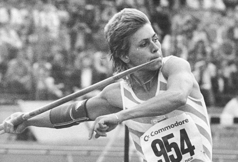 Petra Felke ADN-ZB Sindermann 25.6.88 Rostock: 39. DDR-Meisterschaft Leichtathletik- Mit 73,86 Metern sicherte der Weltmeisterin Petra Felke vom SC Motor Jena bei den Damen den Titelgewinn im Speerwurf.